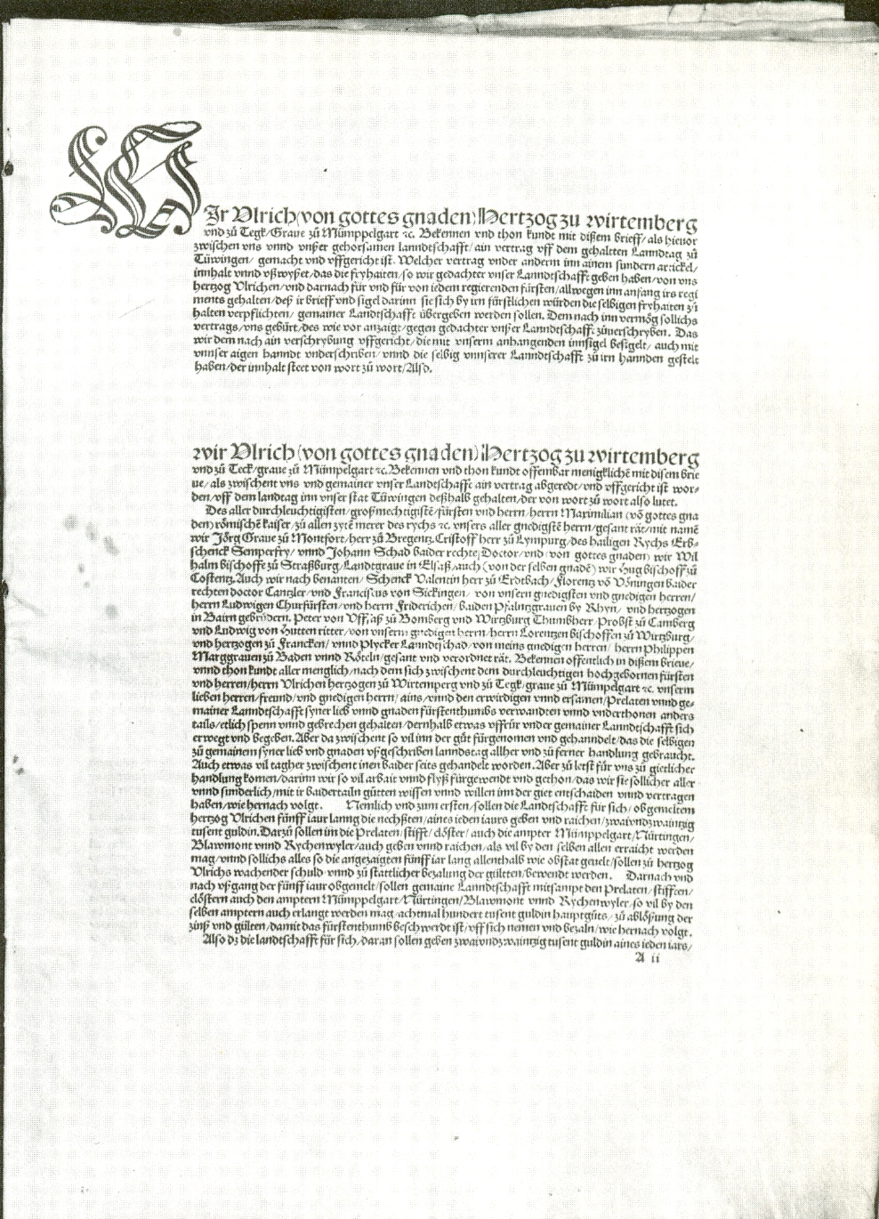 Der Tübinger Vertrag von 1514 Pergamentdruck Hauptstaatsarchiv Stuttgart. S 37 U 1a)